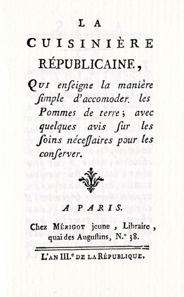 Couverture du livre de Mme Mérigot, La Cuisinière républicaine, paru en 1794 à Paris